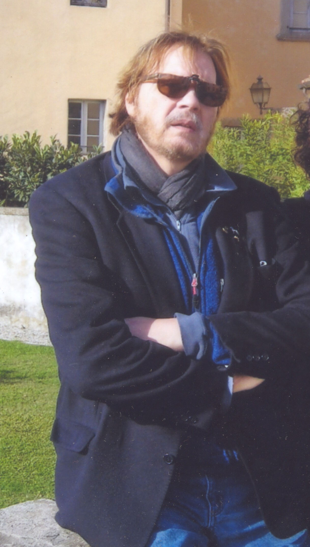 Franco Saudelli